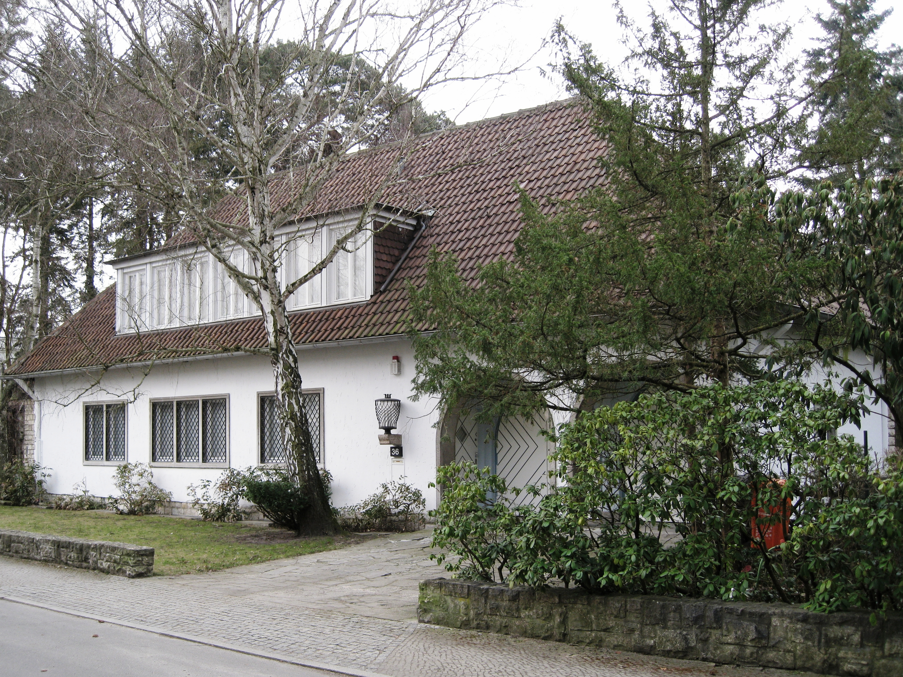 Wohnhaus